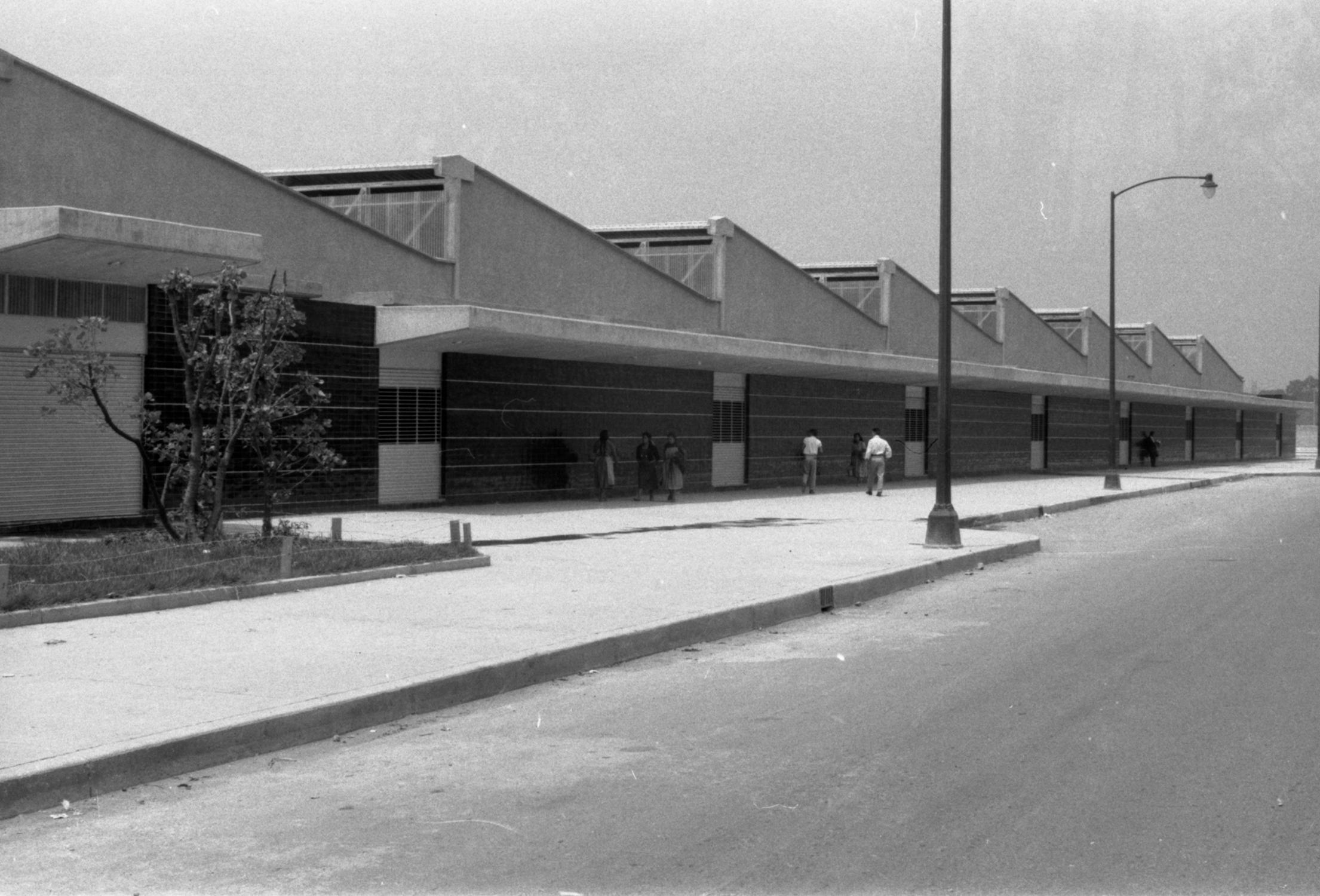 Fotografía antigua de la Ciudad de México resguardadas por el Museo Archivo de la Fotografía (MAF) de la Ciudad de México.